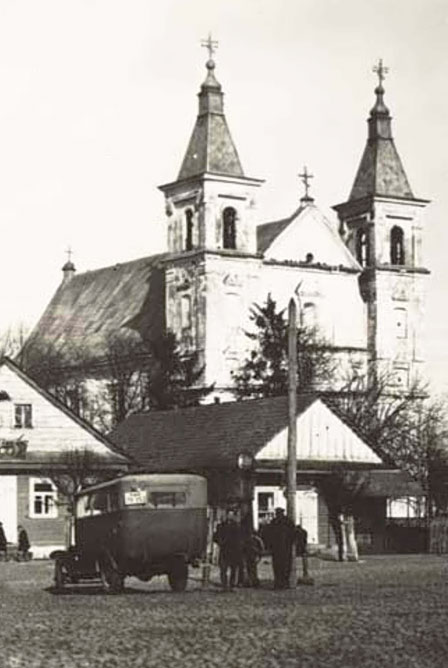 Беларуская (тарашкевіца): Клецак (Klecak), пляц Рынак (plac Rynak). Касьцёл Зьвеставаньня Найсьвяцейшай Панны Марыі і кляштар дамініканаў